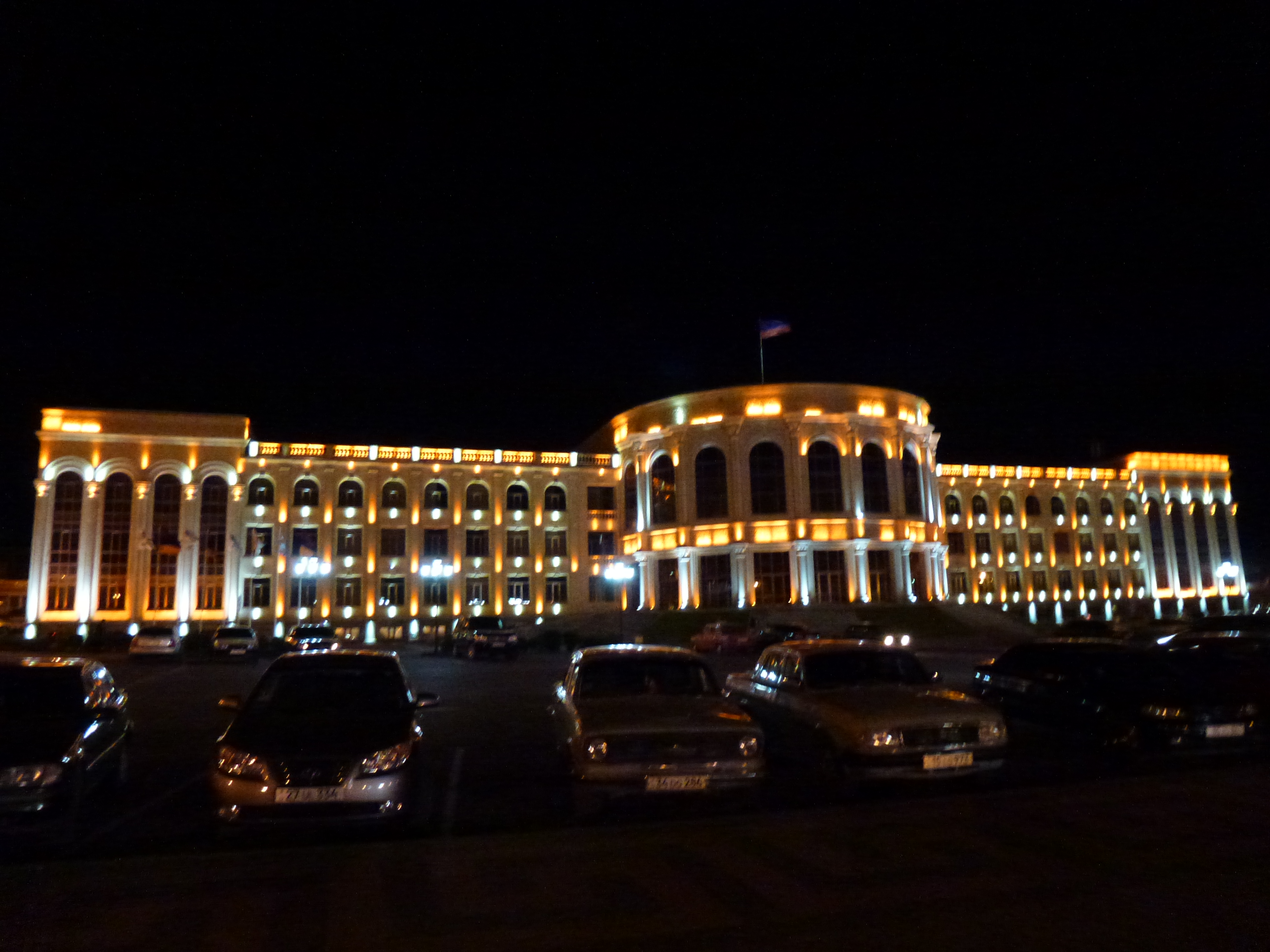 Գյումրիի քաղաքպետարանի շենքը գիշերով 1/4